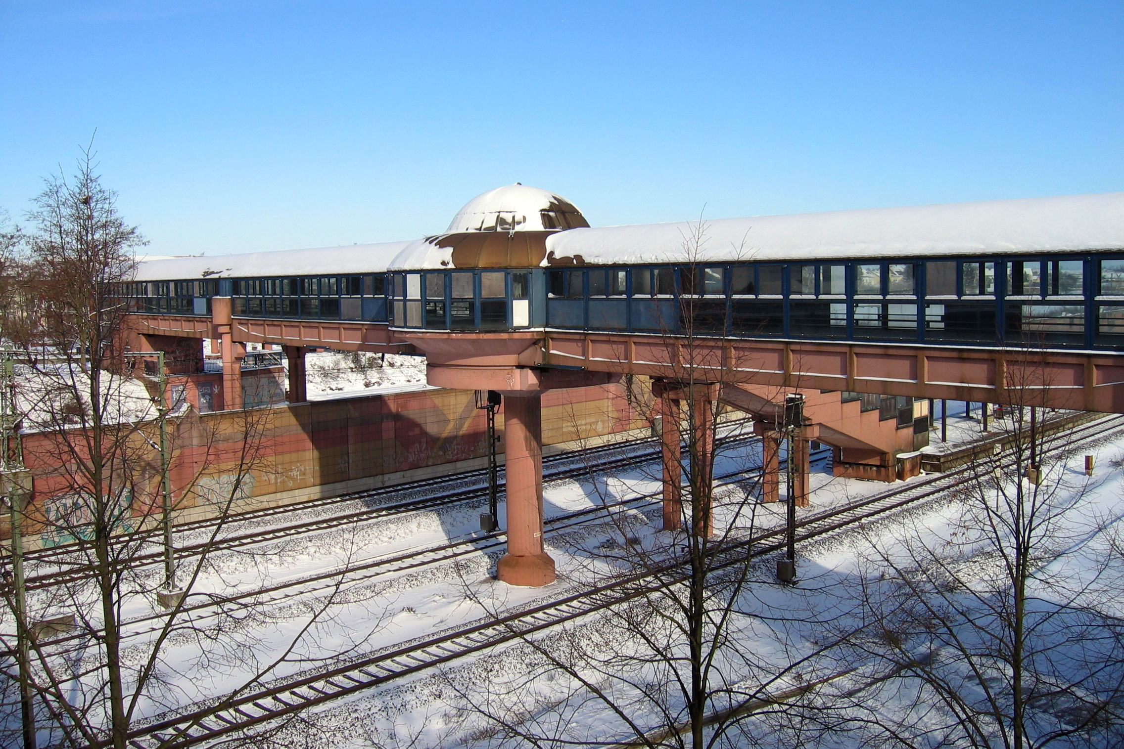 Bahnhof Neulussheim